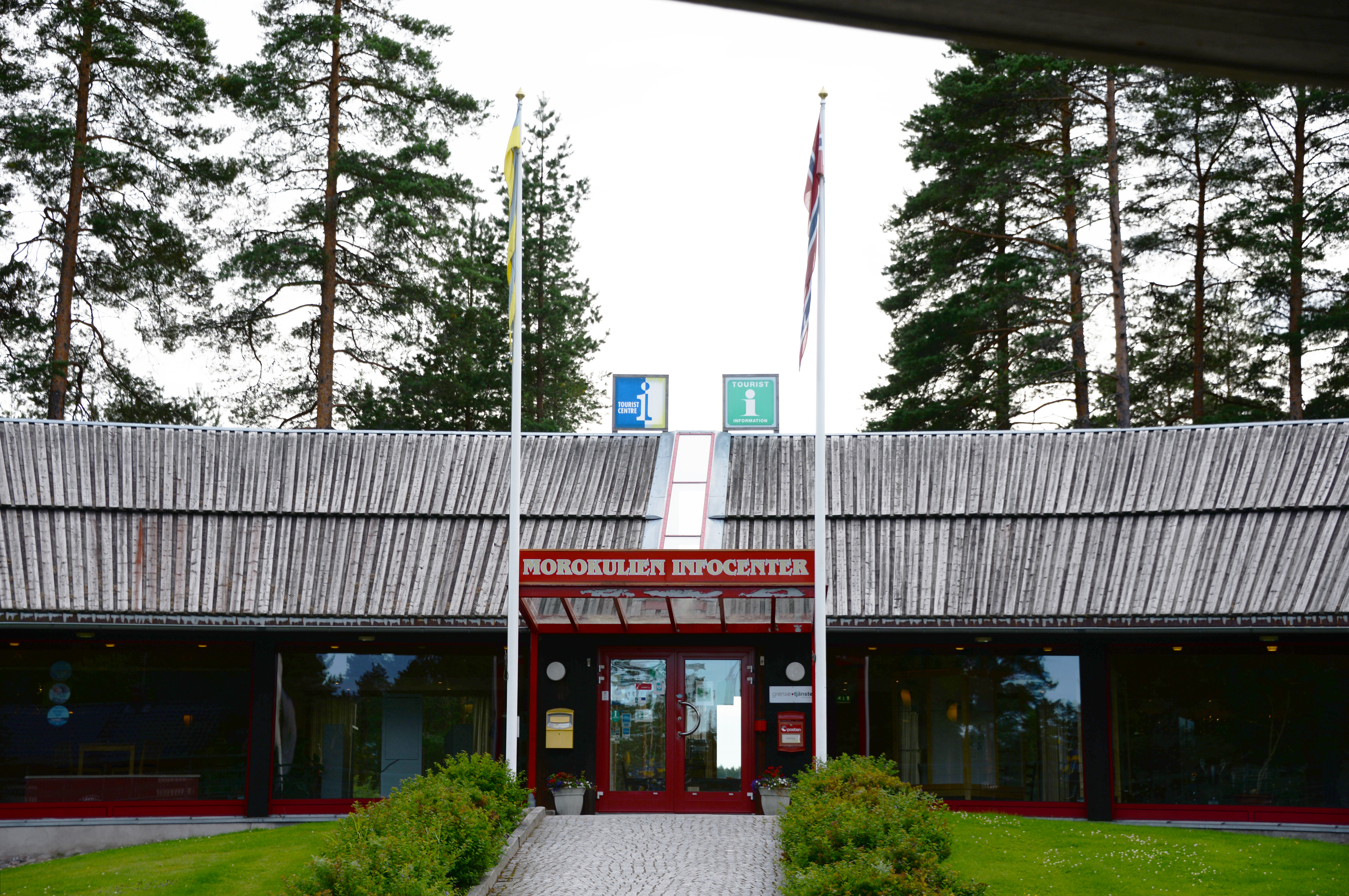 Morokulien Infocenter